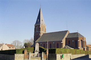 Eglise Borlez